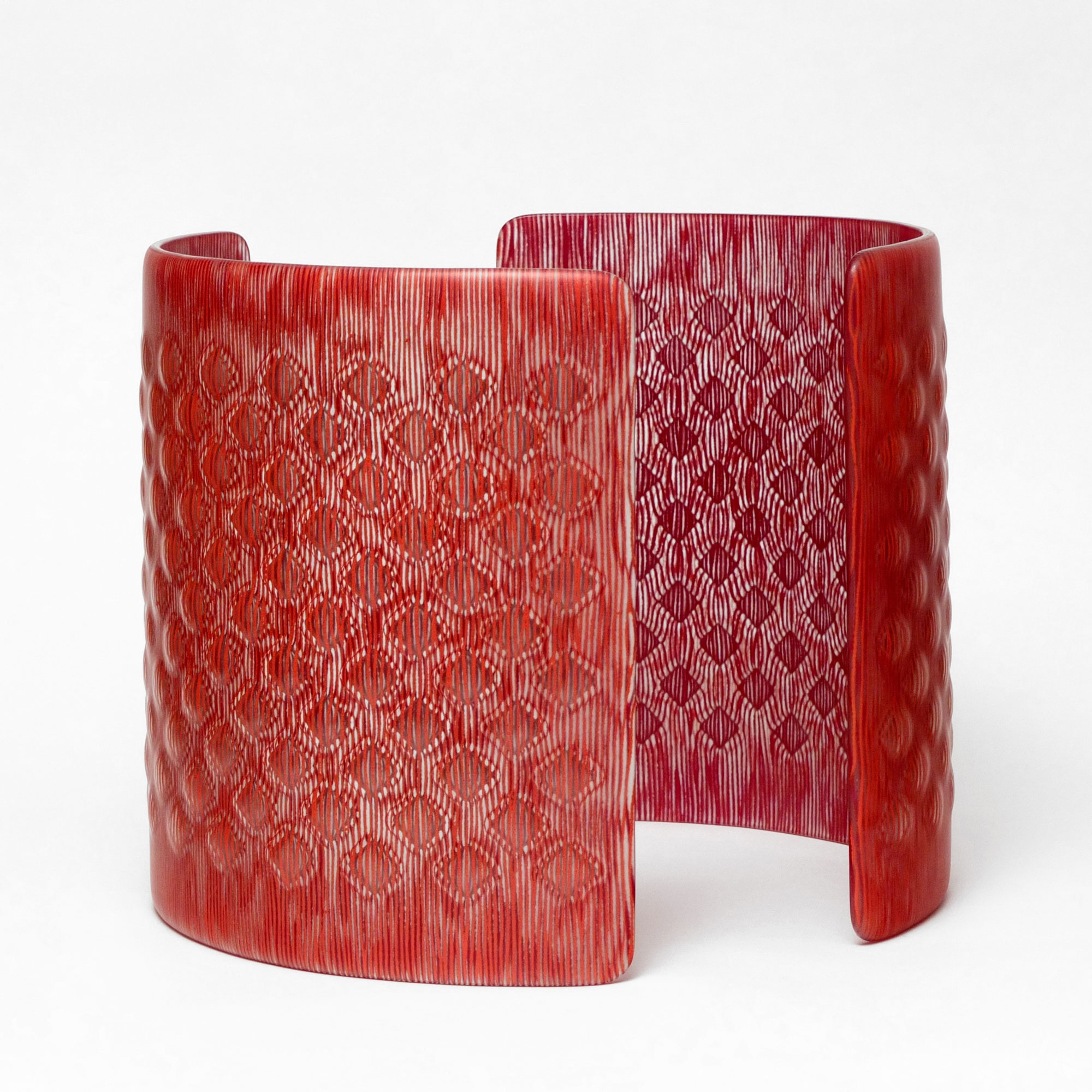 Bogensegmente, 2-Teilig, in Verschmelztechnik, Beschreibung: mit Email eingefärbtes Klarglas, Lufttaschen, Größe: je 31 x 12 x 31cm